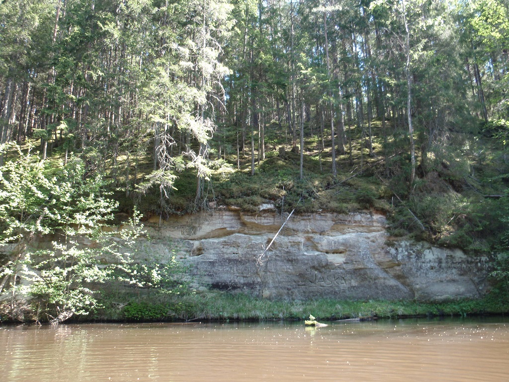 Roio pae, 2015 mai